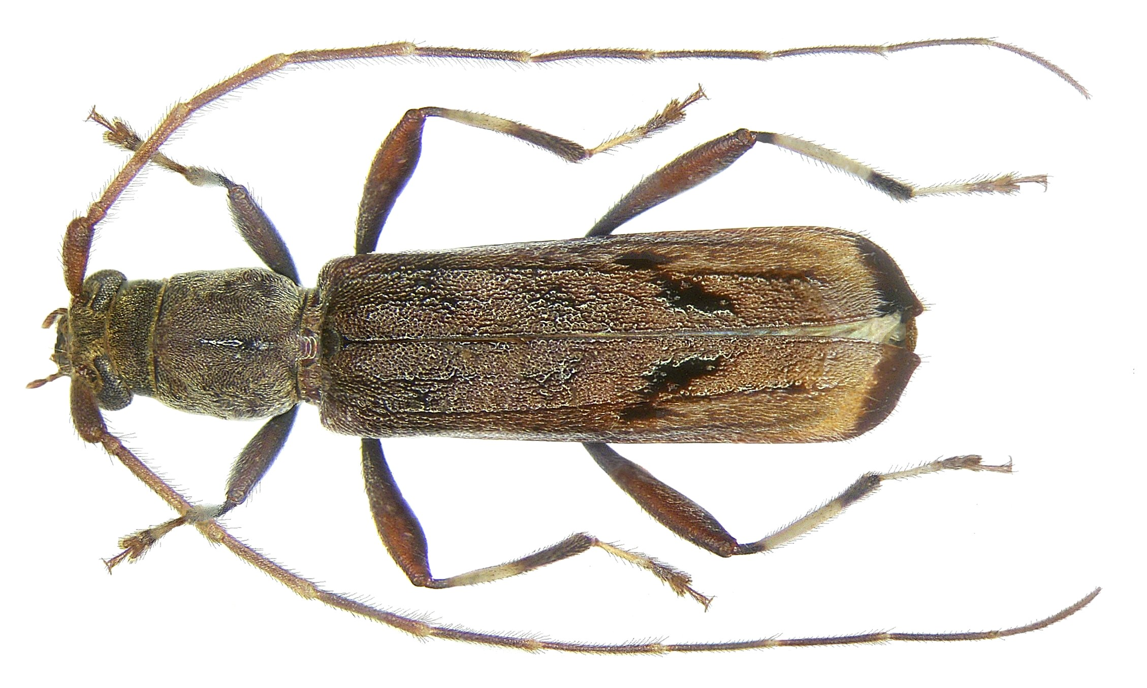 Familie: Cerambycidae Grösse: 12 mm Fundort: Indonesien, Irian Jaya, Manokwari-Prov. Ransiki leg.det. A.Weigel, 2007 Foto: U.Schmidt, 2007